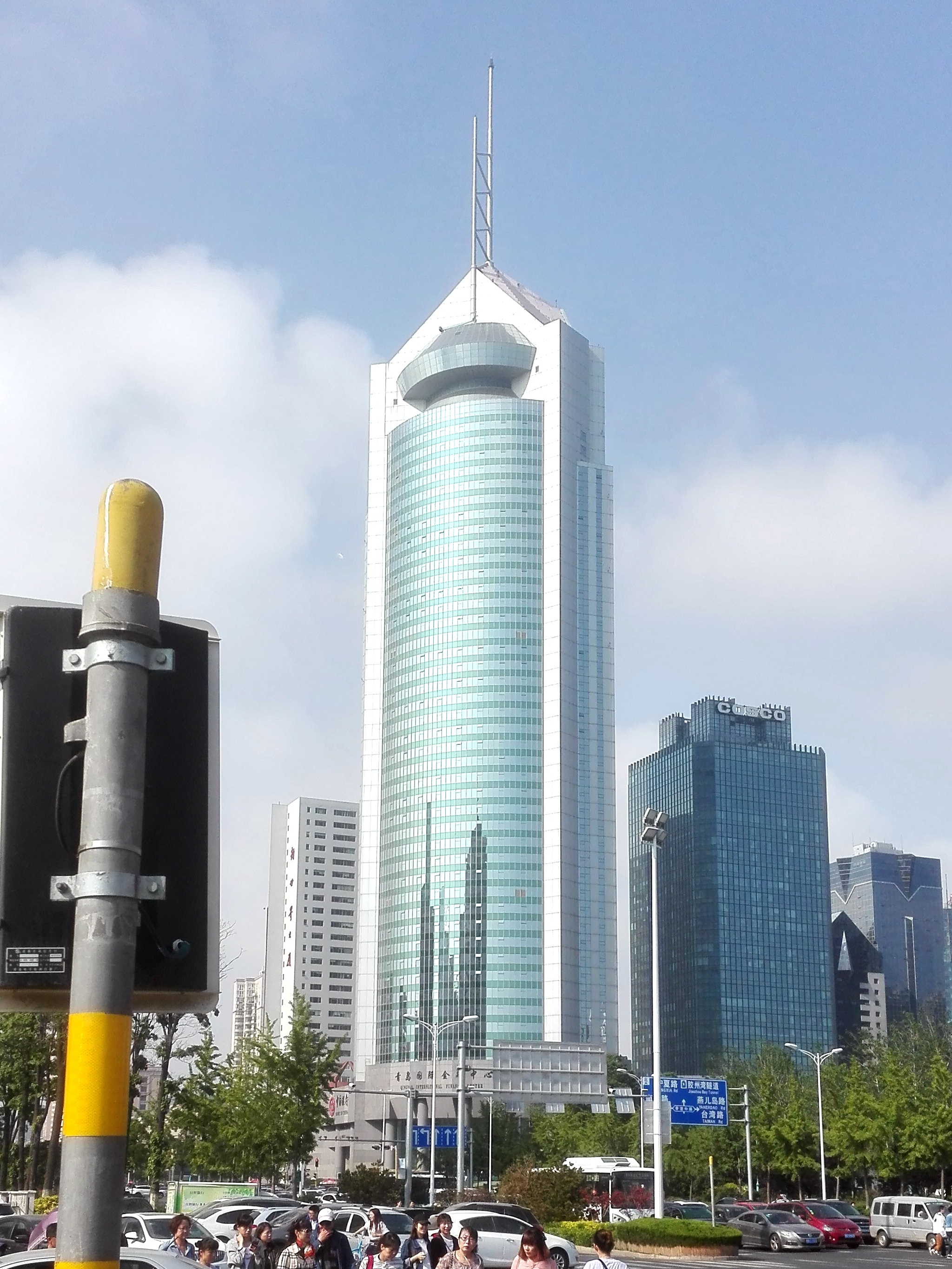 青岛国际金融中心，剪裁调整后版本